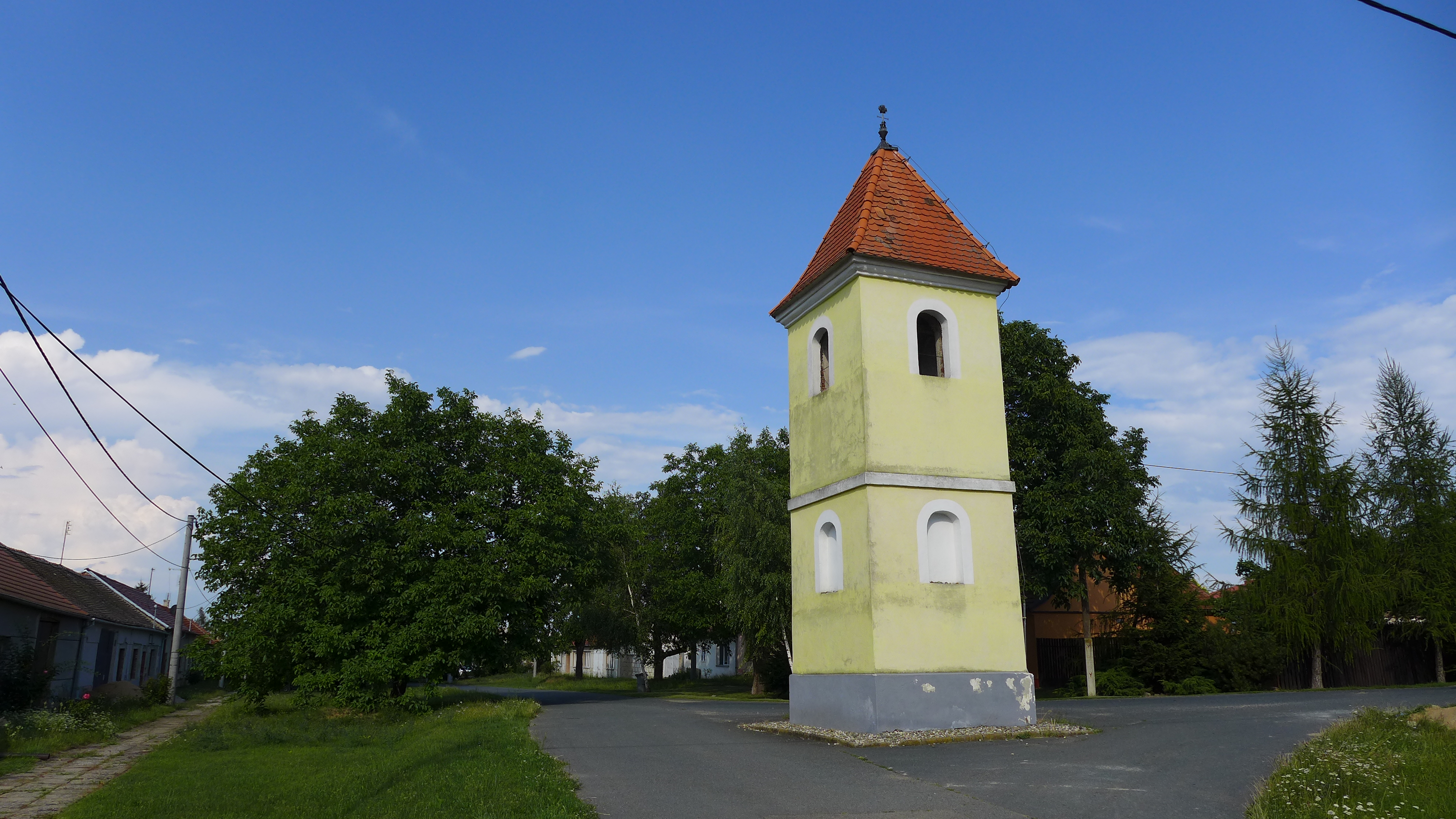 Zvonička (Branišovice), Branišovice, Z okraj obce, Na vinohrádkách, Branišovice, Branišovice.